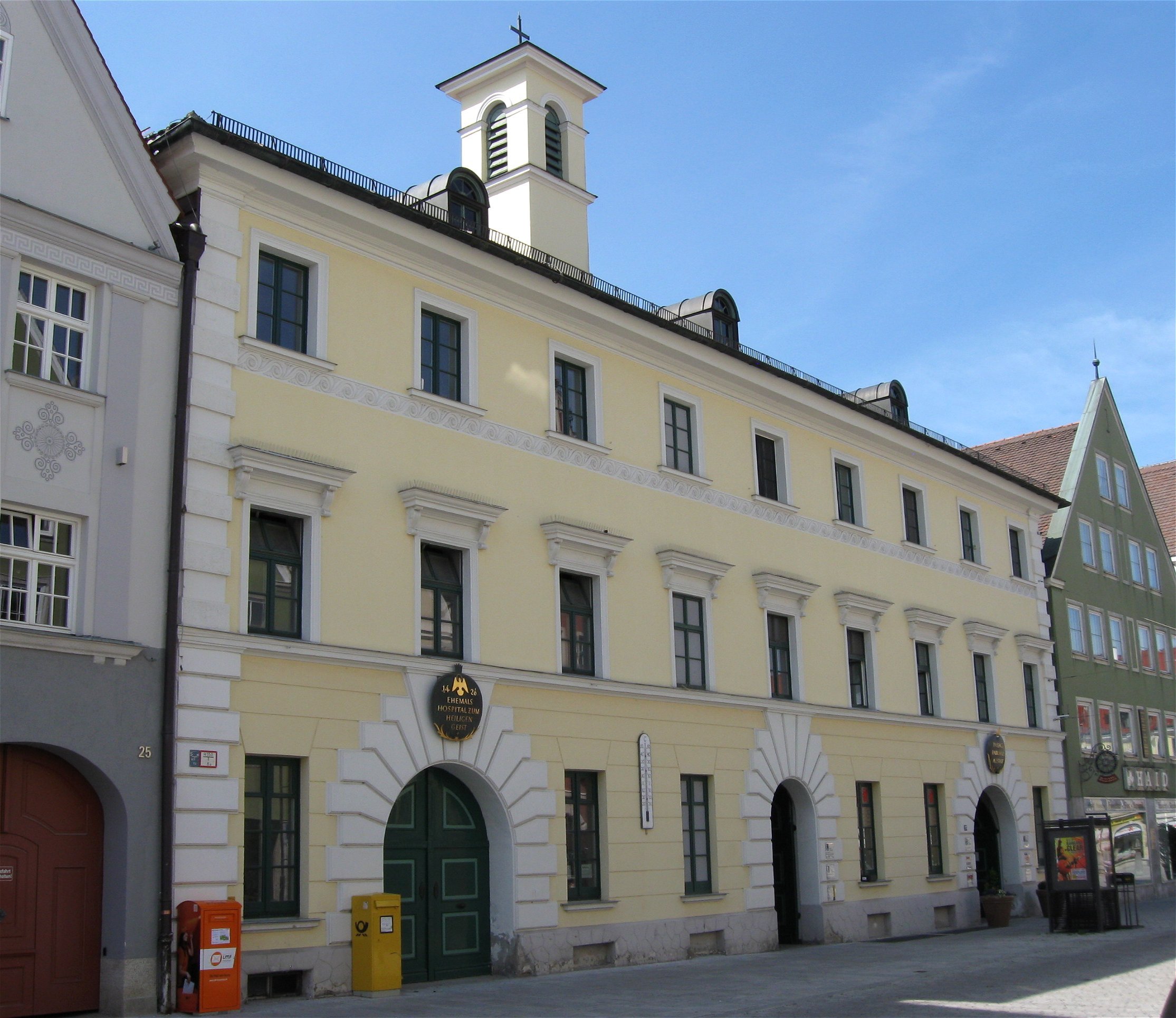 Maximilianstraße 27, 27a; ehem. Spital zum Hl. Geist, dreigeschossiger Walmdachbau mit Dachreiter, zwei Flügeln und Kapelle im Hauptbau, 1678, Umgestaltung und Veränderung der Fassade durch Johann Michael Voit 1829-32; mit Ausstattung. D-7-78-173-81